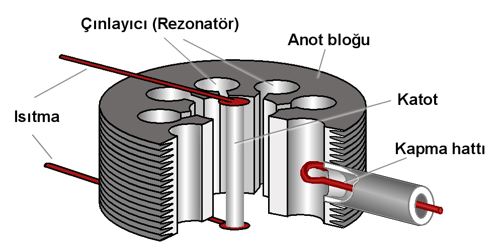 Diese Grafik wurde selbst erstellt. Sie wurde bis zum 21.12.2013 auch auf der Seite Radartutorial verwendet. Von dieser Seite bin ich ebenfalls der Autor. (Ab 2014 wird sie dort durch eine andere Datei ersetzt.)